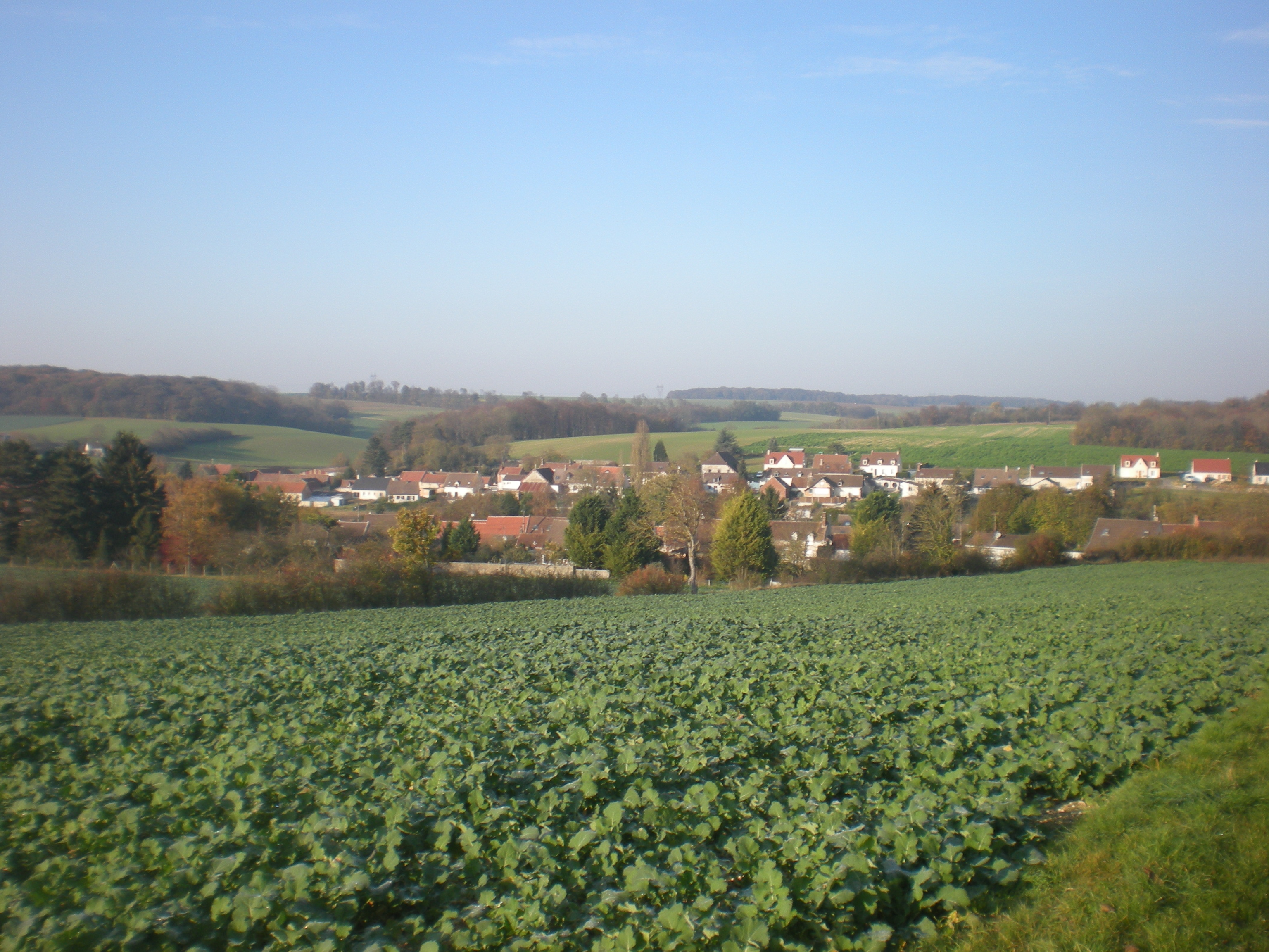 vue générale du village